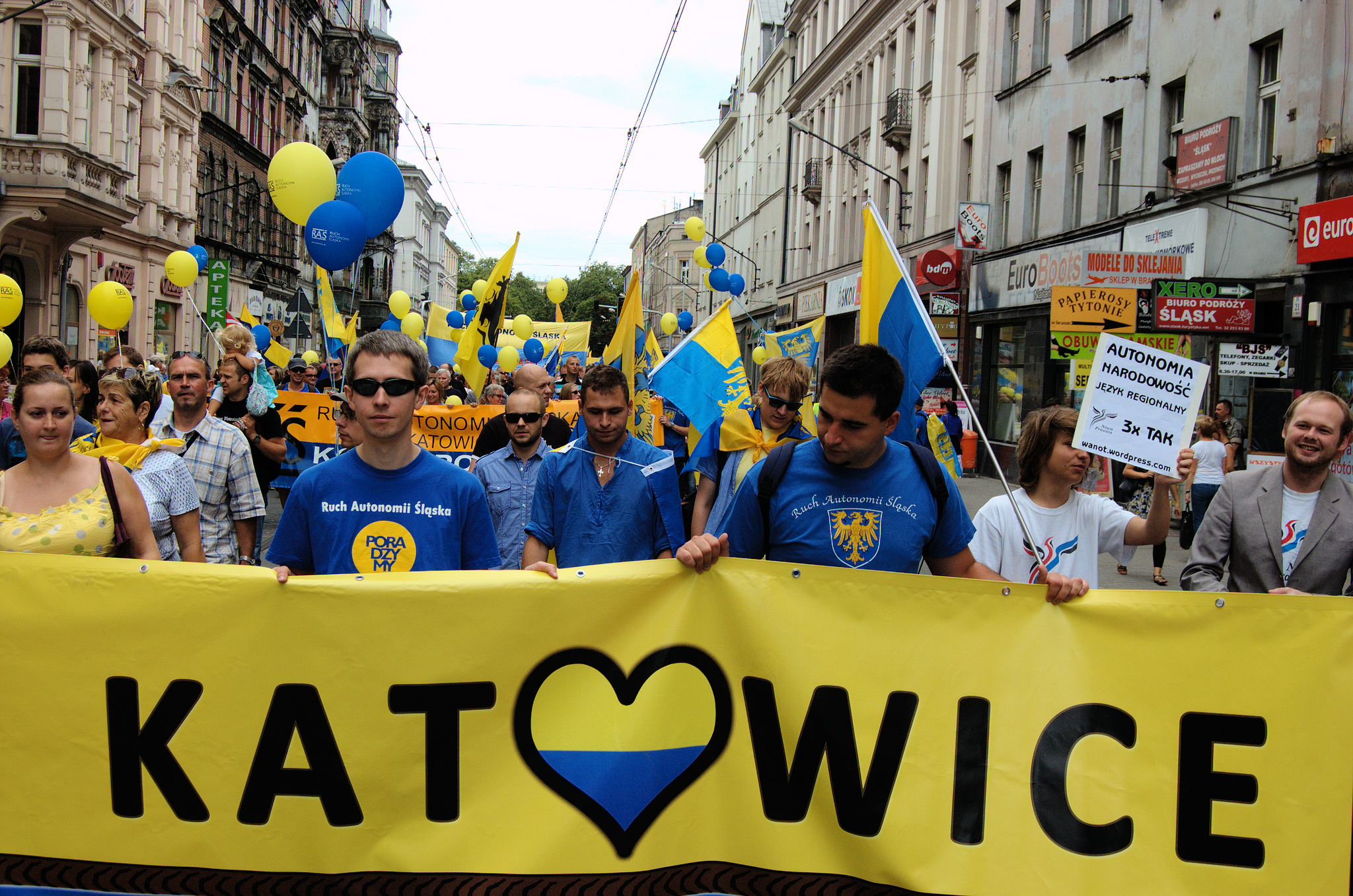 Demonstranci noszący transparent Katowice w górnośląskich barwach.